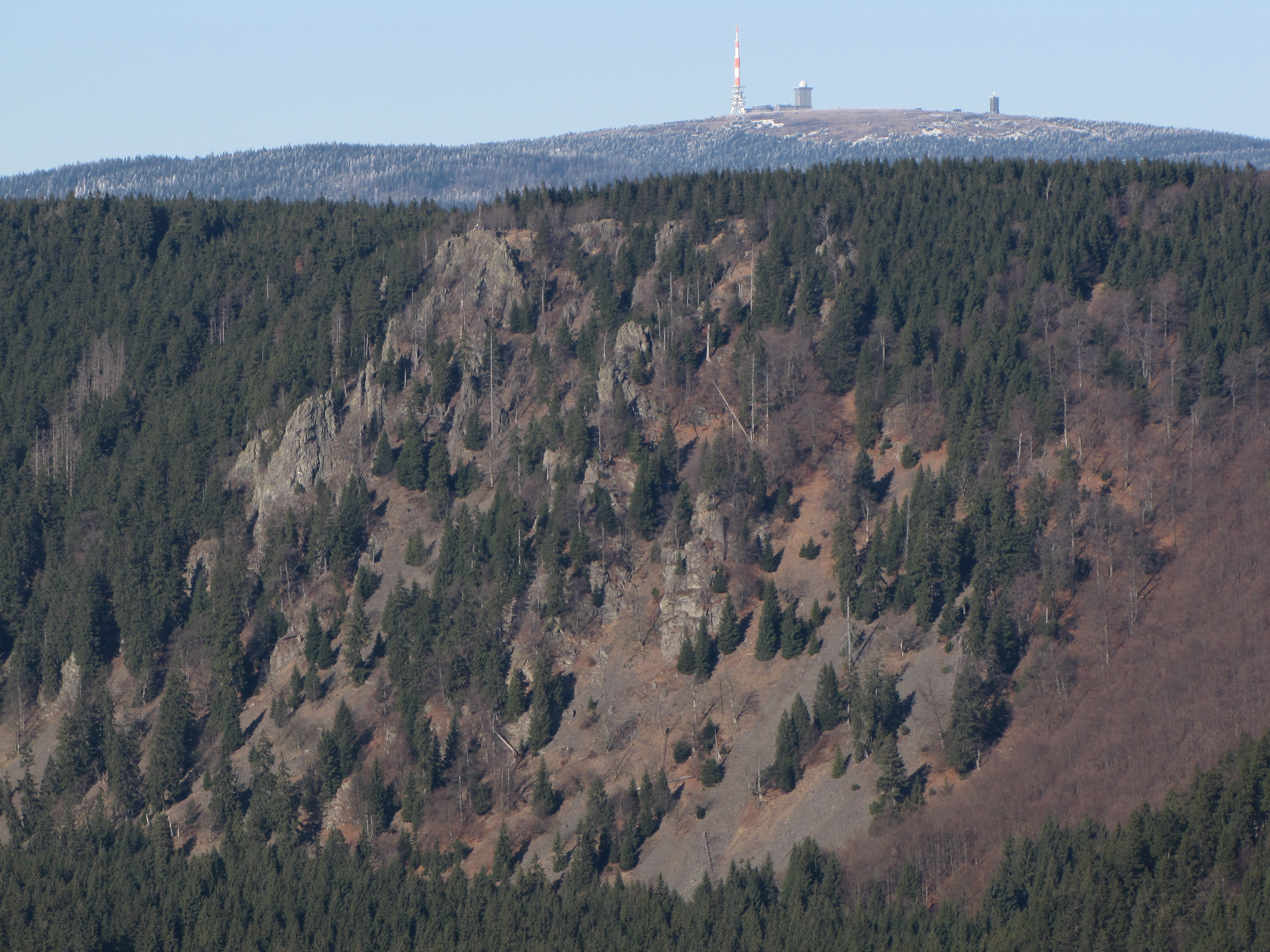 Die Hahnenkleeklippen bei Braunlage, aufgenommen von der Jordanshöhe bei Sankt Andreasberg